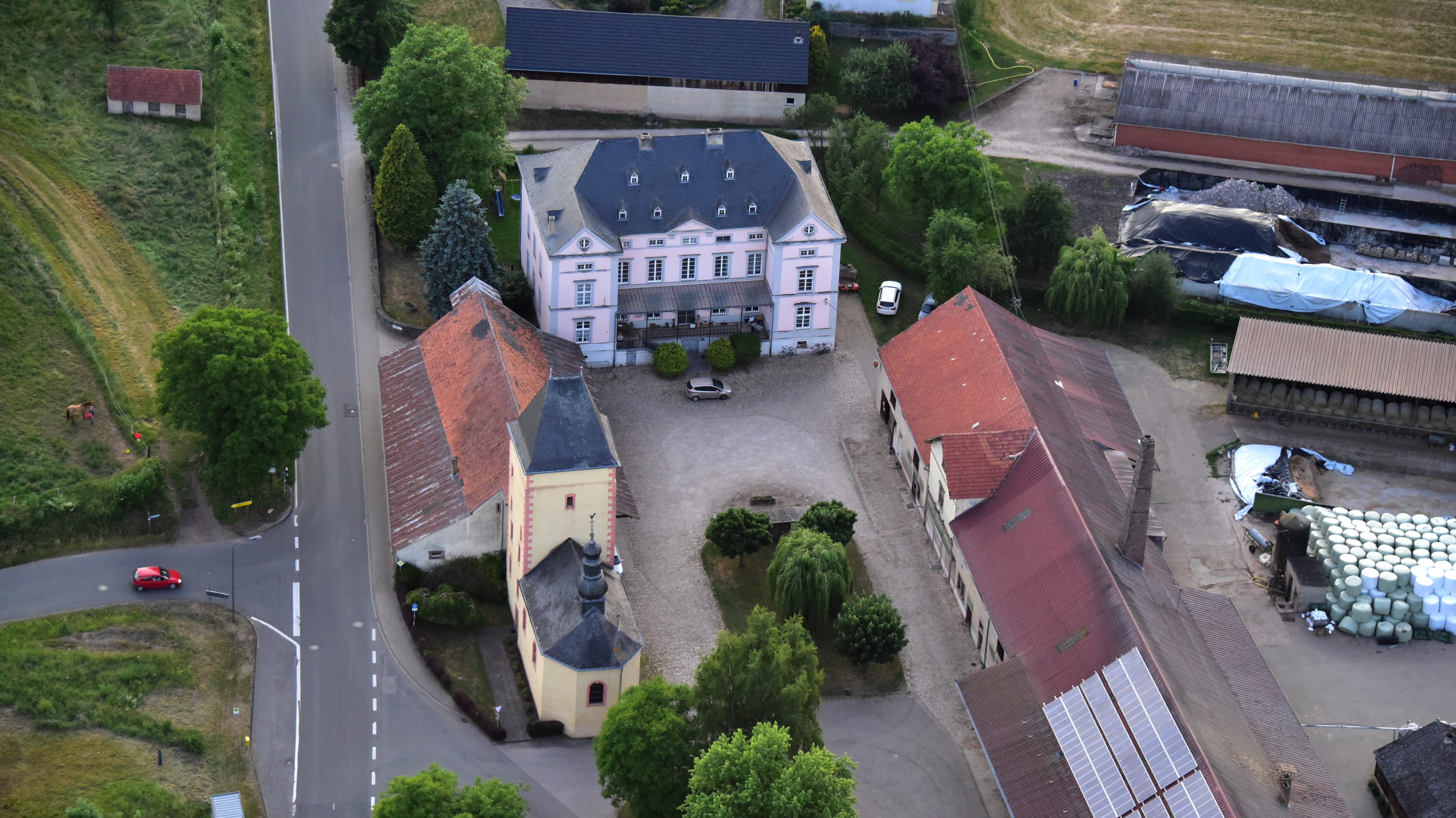 Schlossgut Petry, Luftaufnahme (2017)